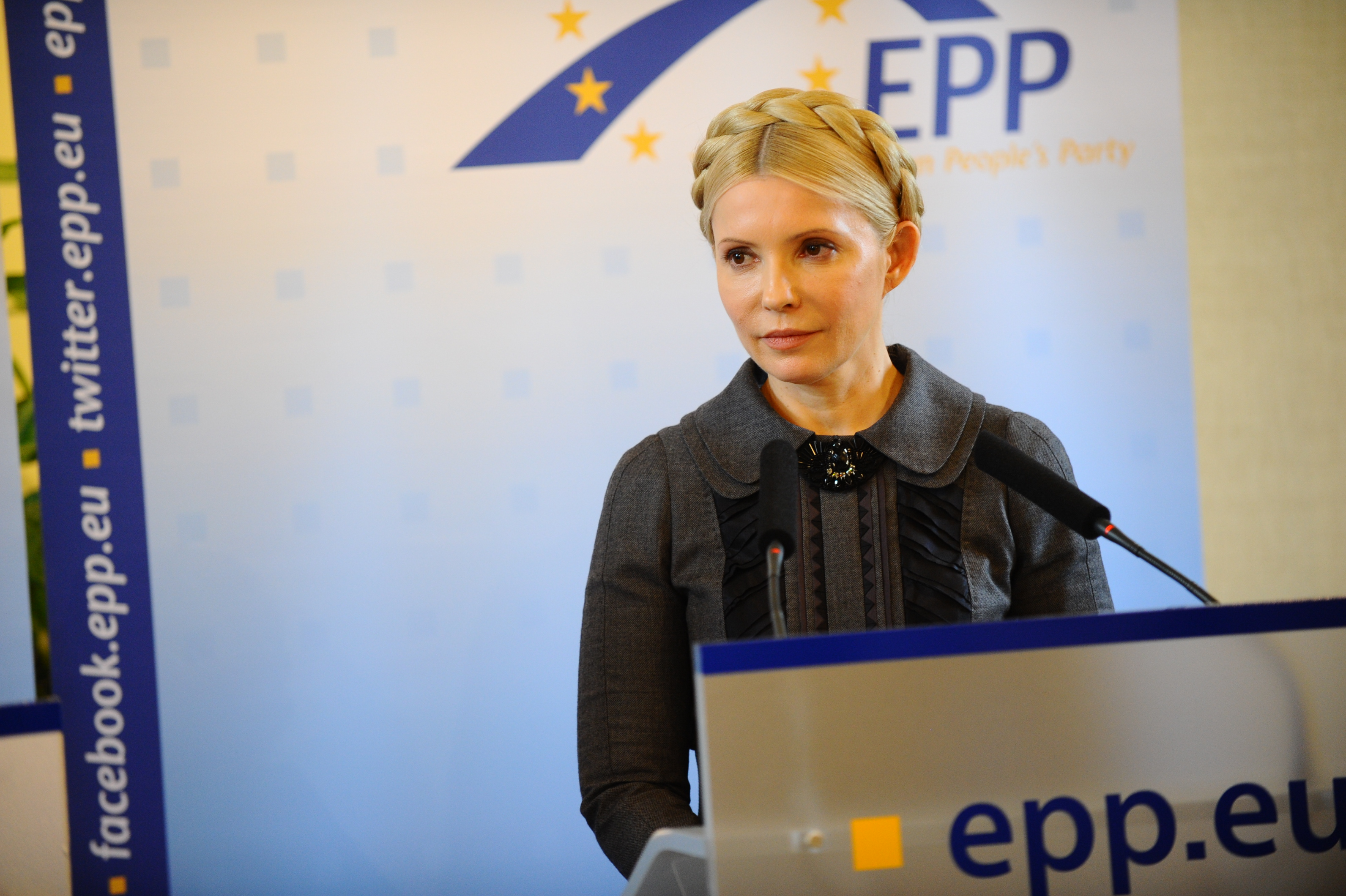 Yulia Tymoshenko